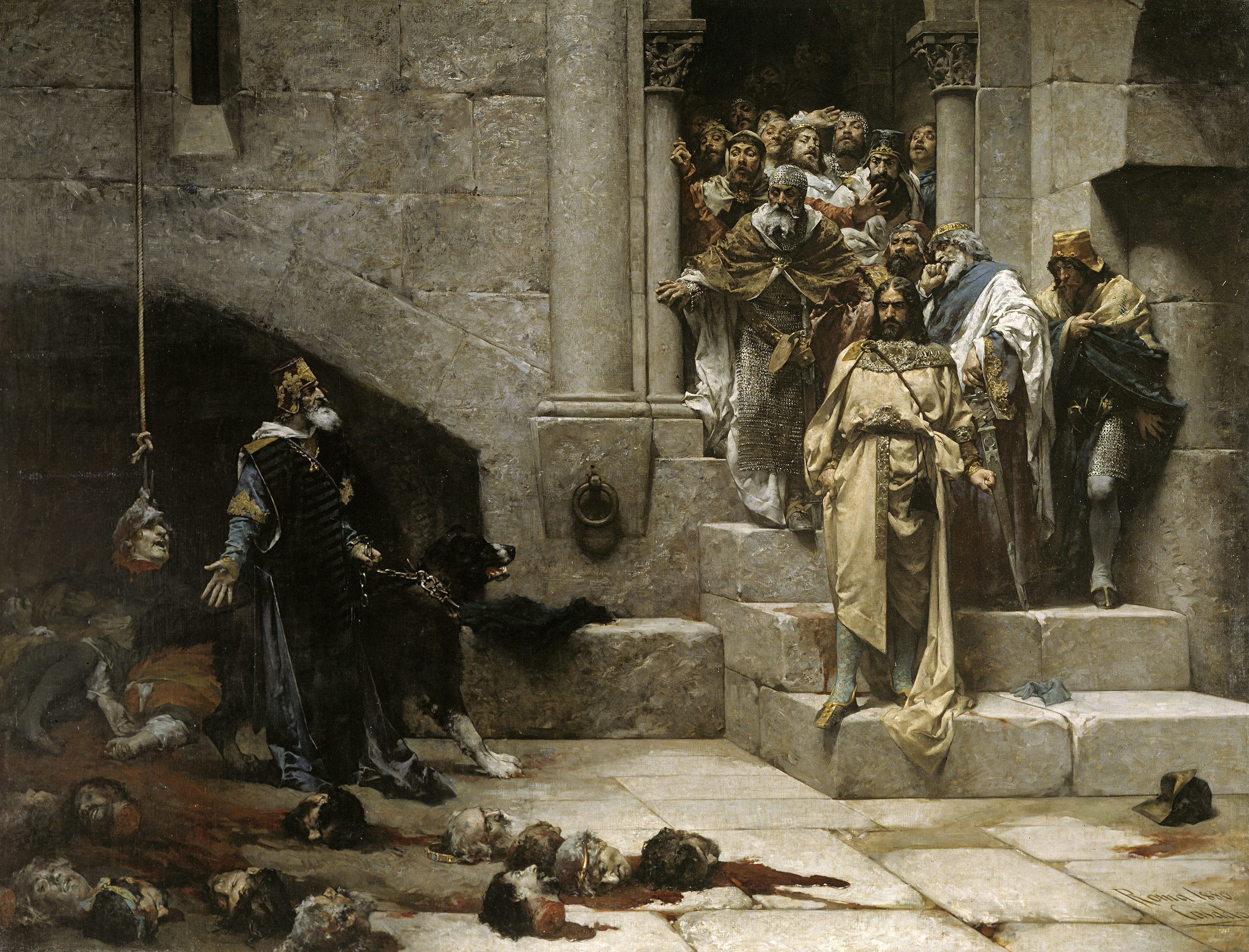 El cuadro recrea el momento final de la leyenda de la Campana de Huesca, cuando el rey Ramiro II de Aragón mostró a los nobles de su reino las cabezas cortadas, y dispuestas en forma de campana, de los principales nobles que habían desafiado su autoridad. José Casado del Alisal obtuvo una mención honorífica con esta obra en la Exposición Nacional de Bellas Artes de España de 1881, siéndole concedida además la Gran Cruz de la Orden de Isabel la Católica, aunque ya era comendador de número de la Orden de Carlos III, y un año después, en 1882, el lienzo fue adquirido por el Estado español por la cantidad de 35.000 pesetas. El lienzo pertenece a la colección del Museo del Prado, aunque se encuentra depositado y se expone en el Ayuntamiento de Huesca desde 1950.